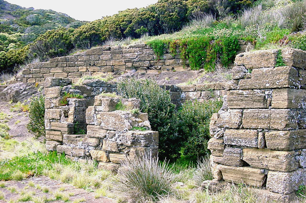 Fortaleza de São João Baptista do Monte Brasil, freguesia da Sé, cidade e concelho de Angra do Heroísmo, ilha Terceira, Açores: Restos das muralhas do Forte de Santo António do Monte Brasil.